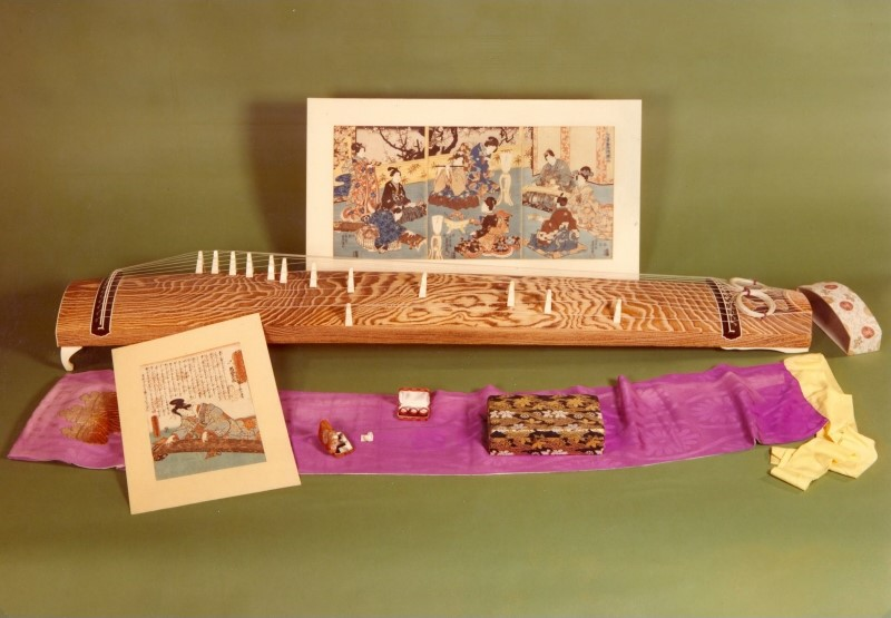 Sahei Mizuno, Hersteller, Musikinstrumentenbauer 1968 Herstellungsort: Osaka